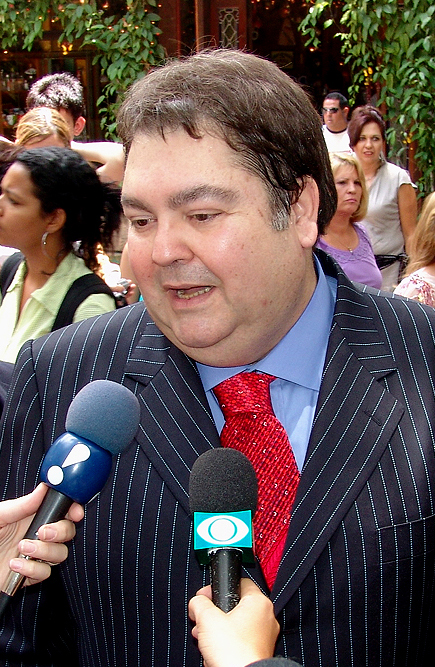 O apresentador de televisão brasileiro Fausto Silva (Faustão).DSC00089